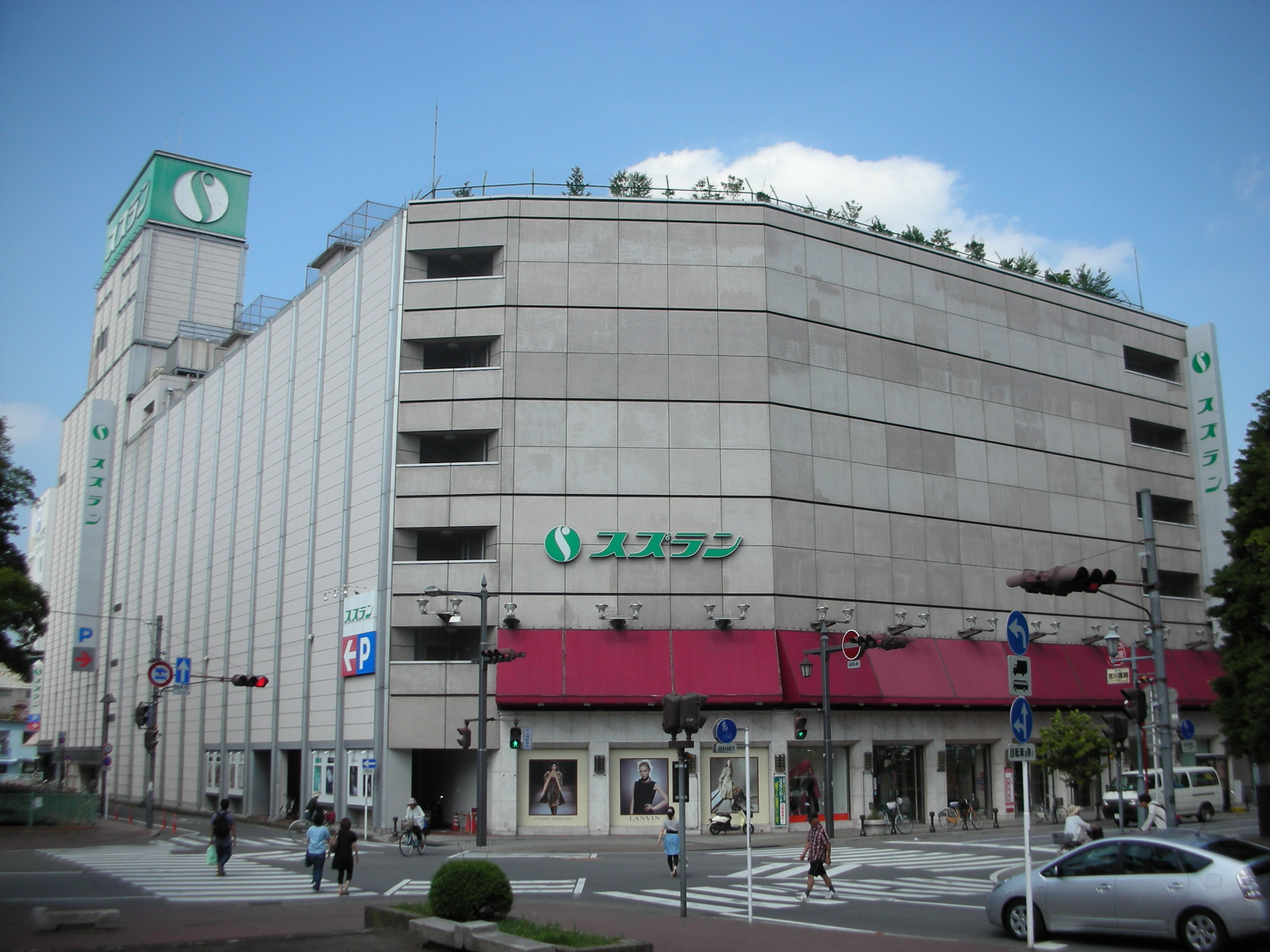 スズラン高崎店の外観